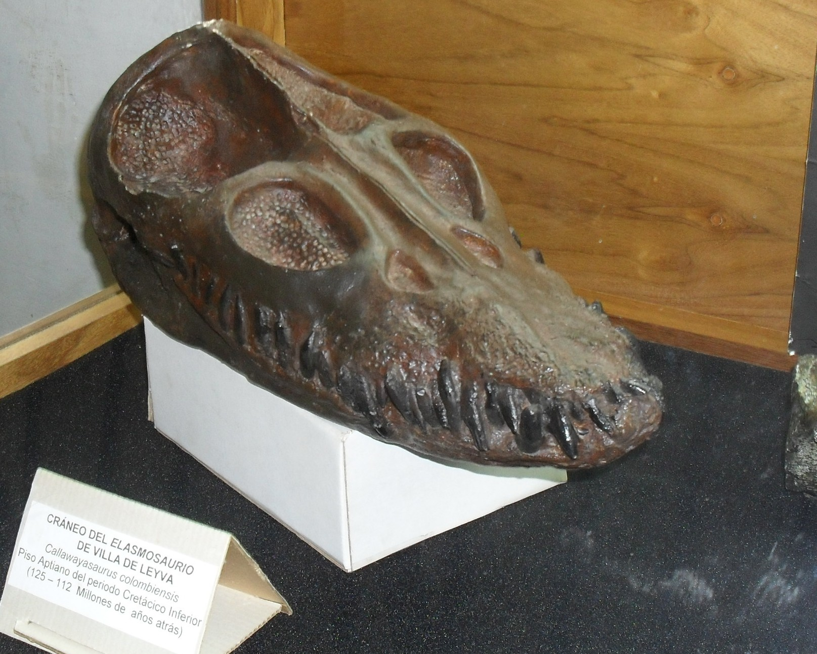 Cráneo de Callawayasaurus colombiensis exhibido en el Museo Paleontológico de Villa de Leyva